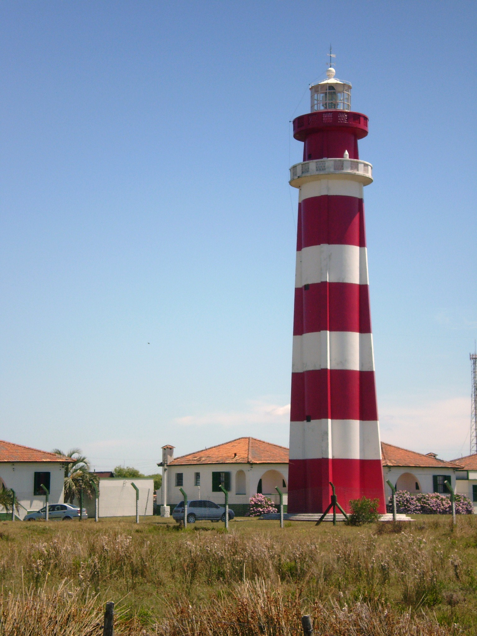 Light house, Barra do Chuí, district of Santa Vitória do Palmar, Rio Grande do Sul, Brazil.